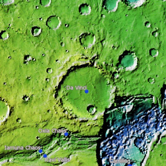 Cráter marciano Da Vinci (Goddard/A SU/USGS)